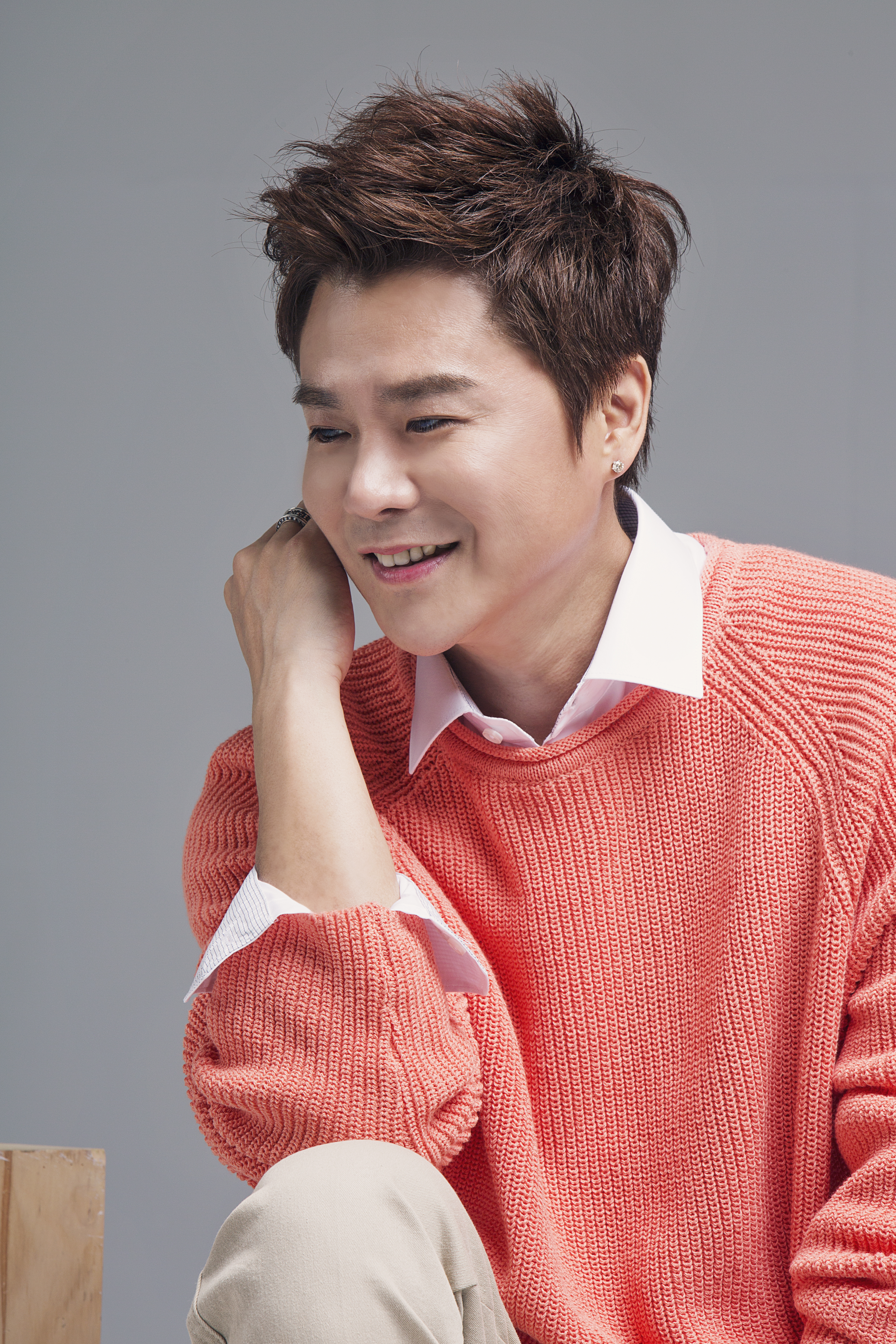 Sanha（サナ） 韓国名：산하 韓国のシンガーソングライター